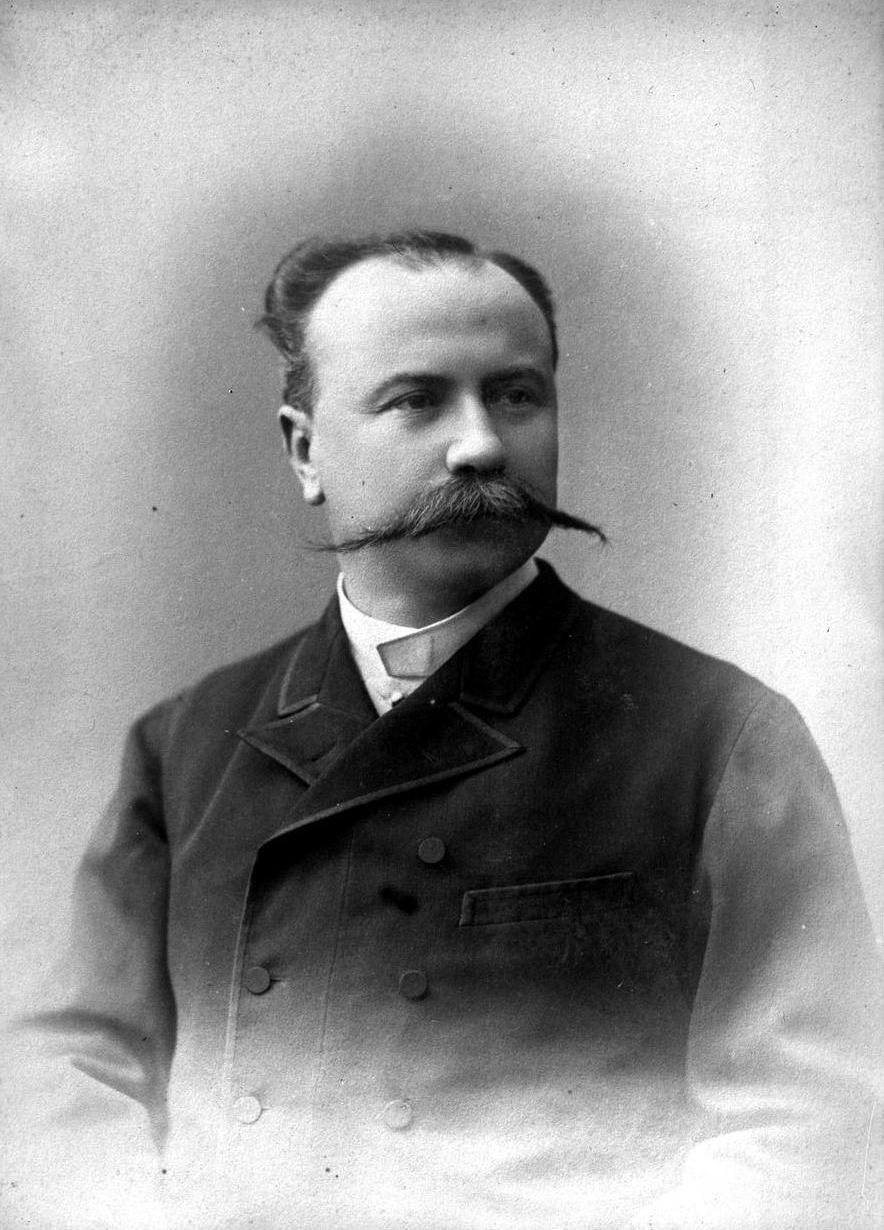 Carlos Walker Martínez (Vallenar, febrero de 1842 - Santiago, 5 de octubre de 1905) Político y Abogado chileno..